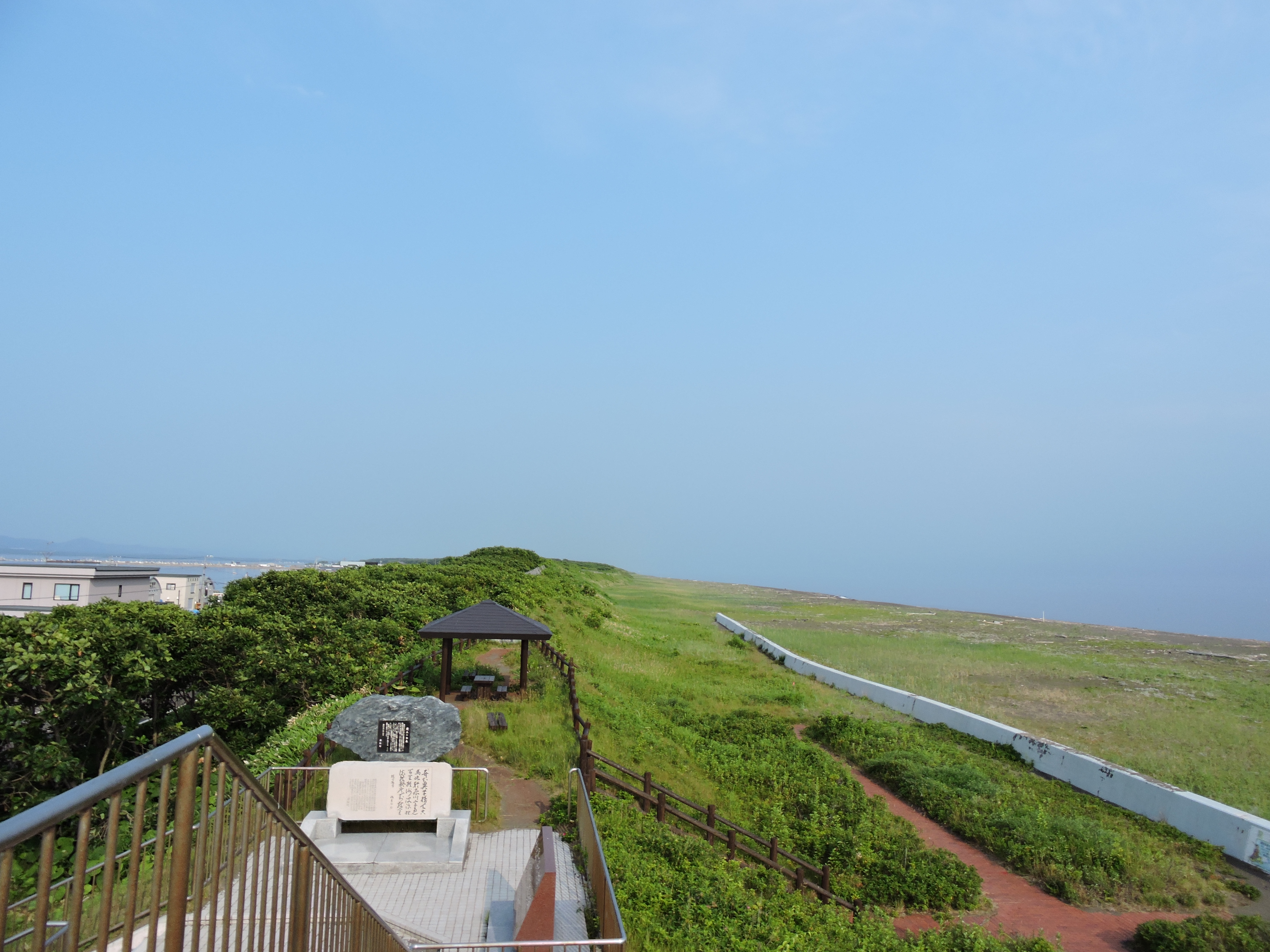 サロマ湖西側砂嘴